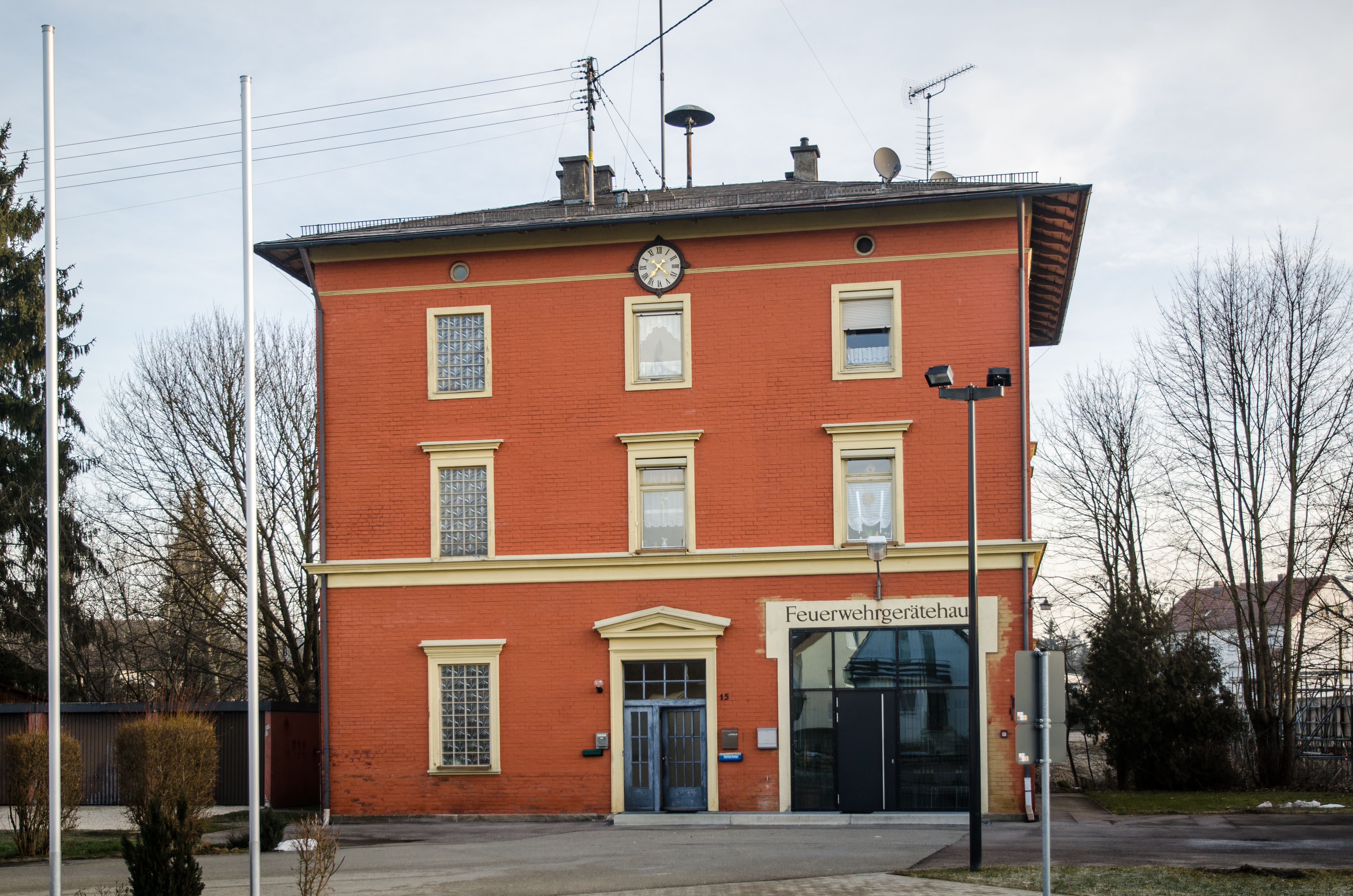 Witzighausen, ehem. Bahnhof